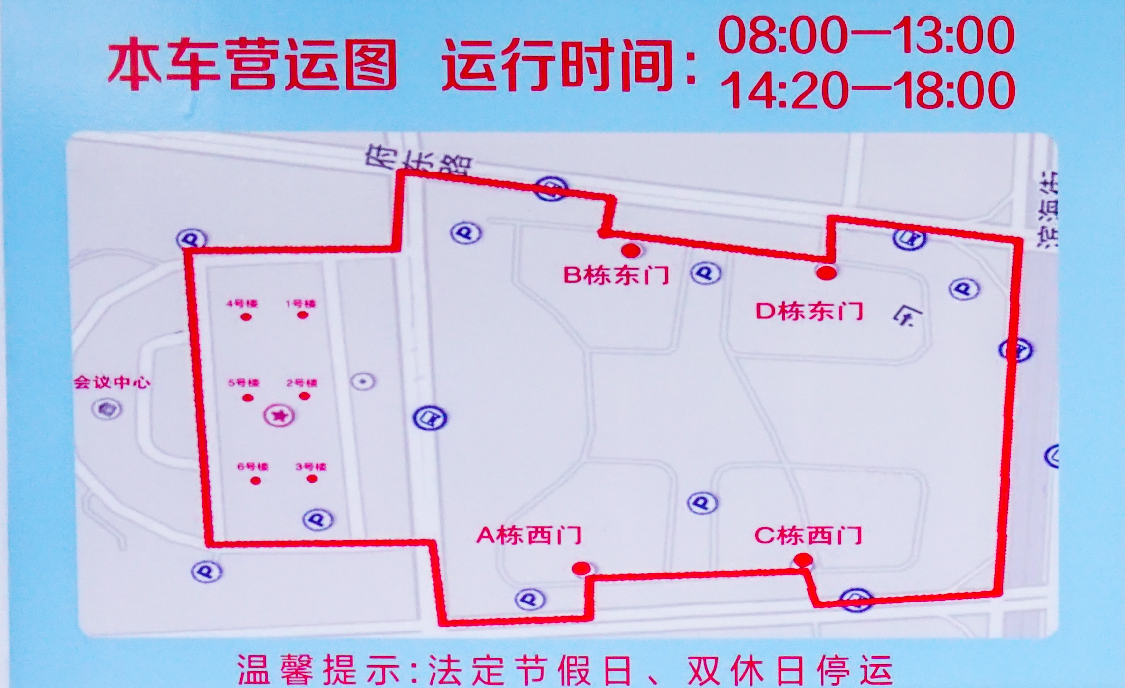 泉州公交X6路运行示意图